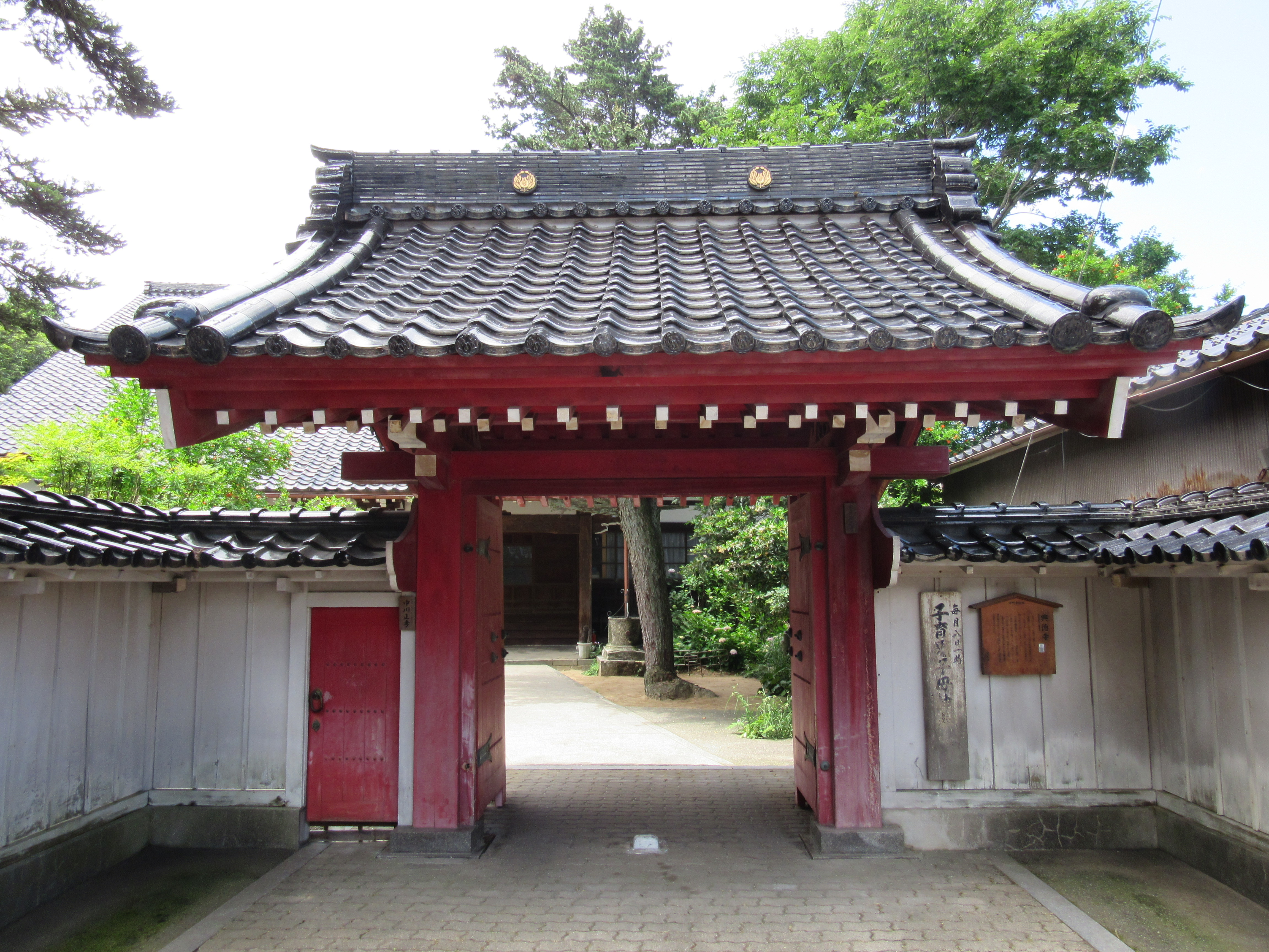 興徳寺山門